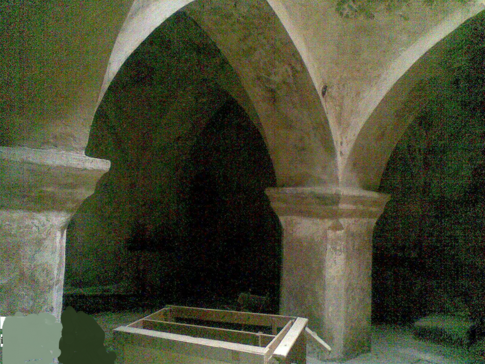 Hamamın içi